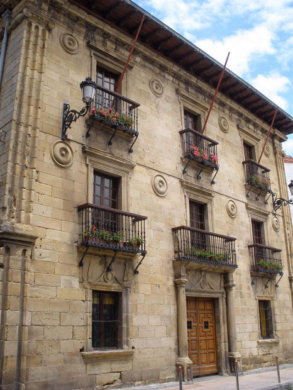 Zarauz - Casa Portu-Ayuntamiento